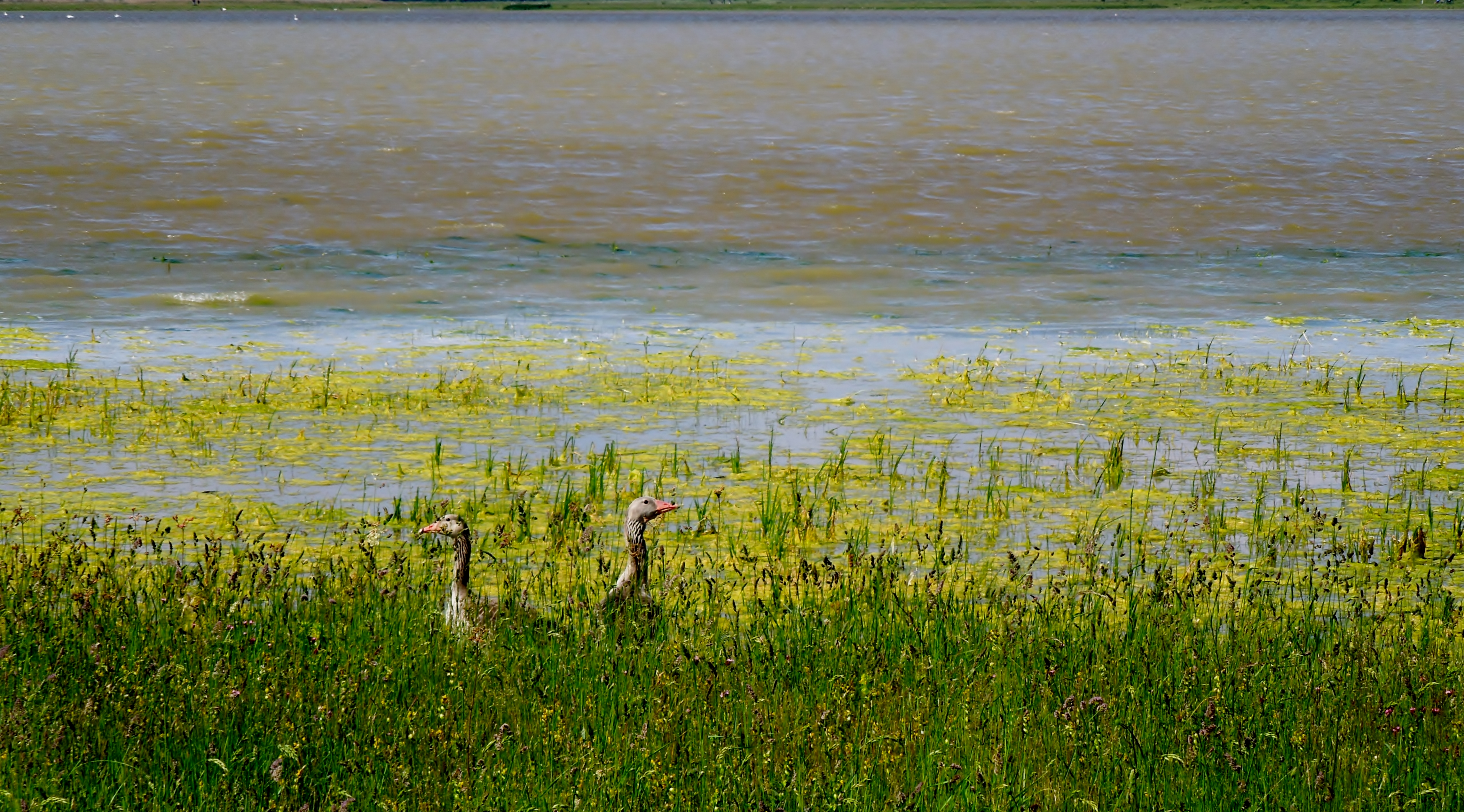 Lange Lacke, Nationalpark Neusiedler See-Seewinkel, Burgenland, Österreich This file shows the National Park Neusiedler See-Seewinkel in Austria.